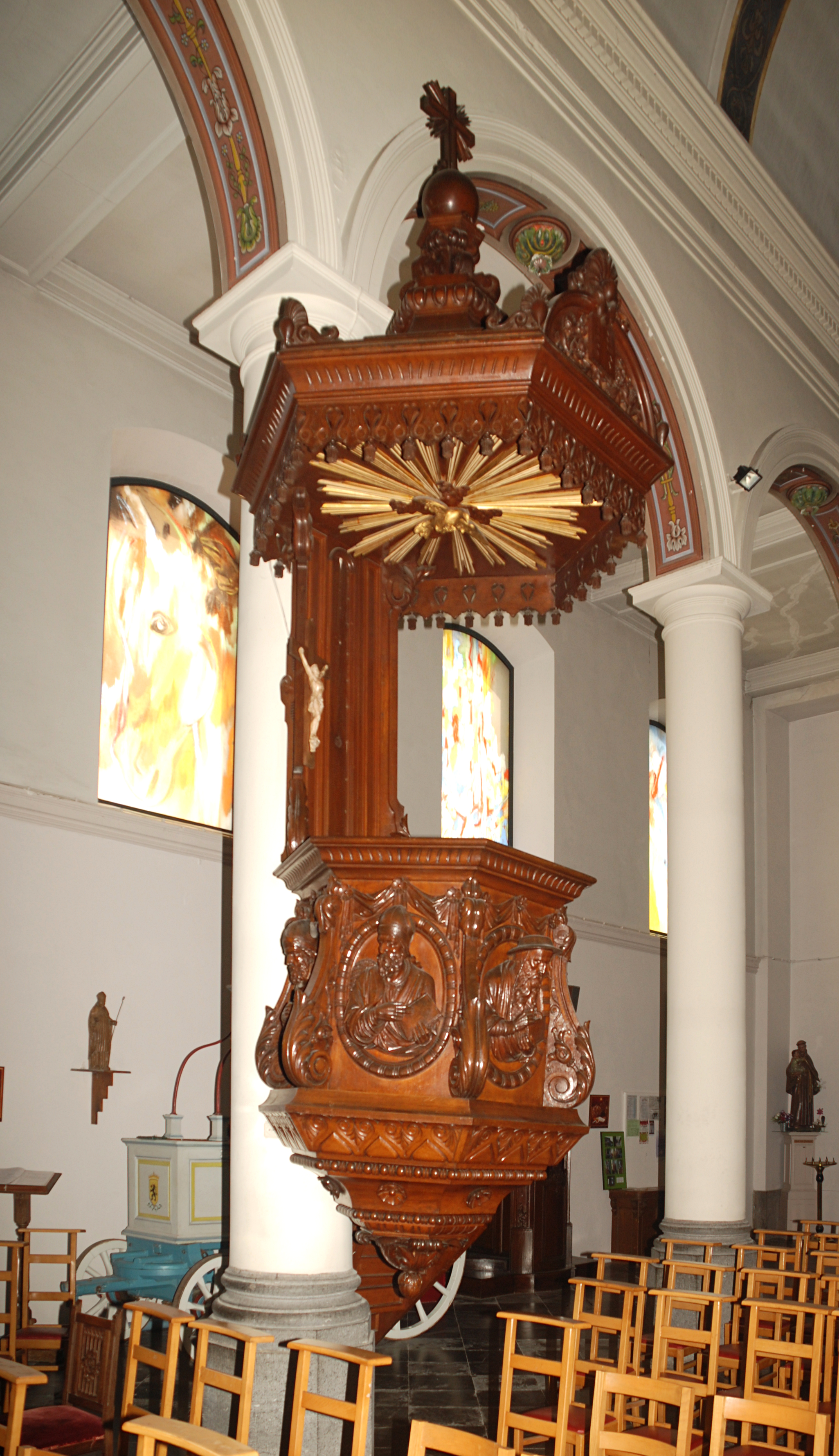 Belgique - Bousval - Église Saint-Barthélemy de Bousval